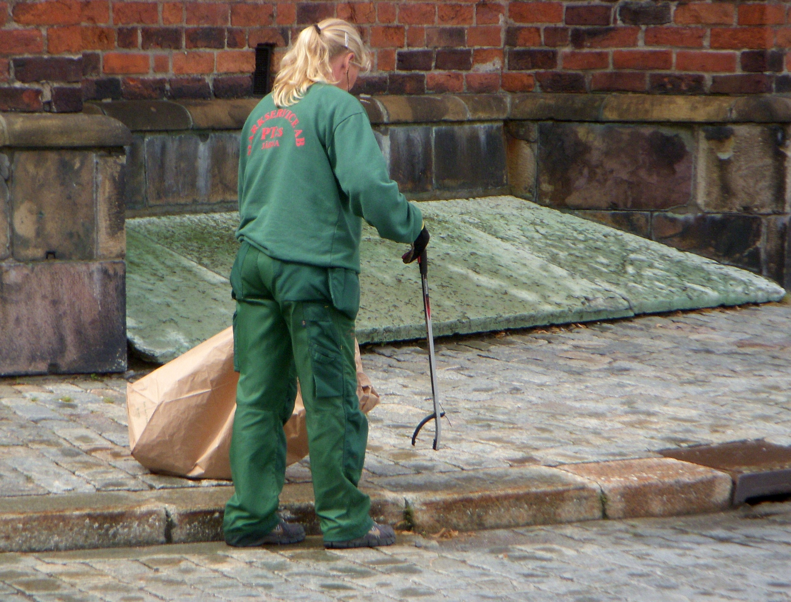 Skräpplockning på Riddarholmen